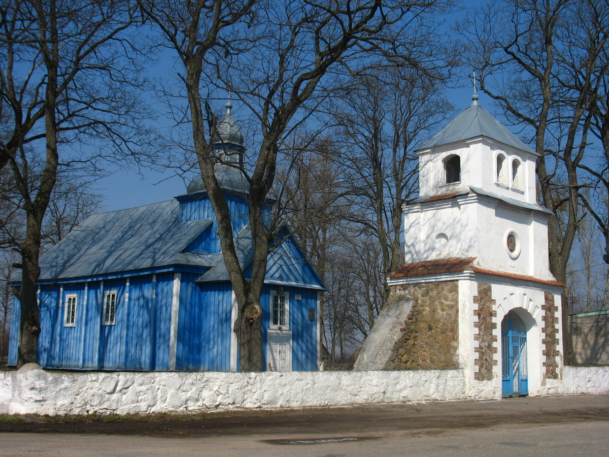 Беларуская (тарашкевіца): Бялавічы